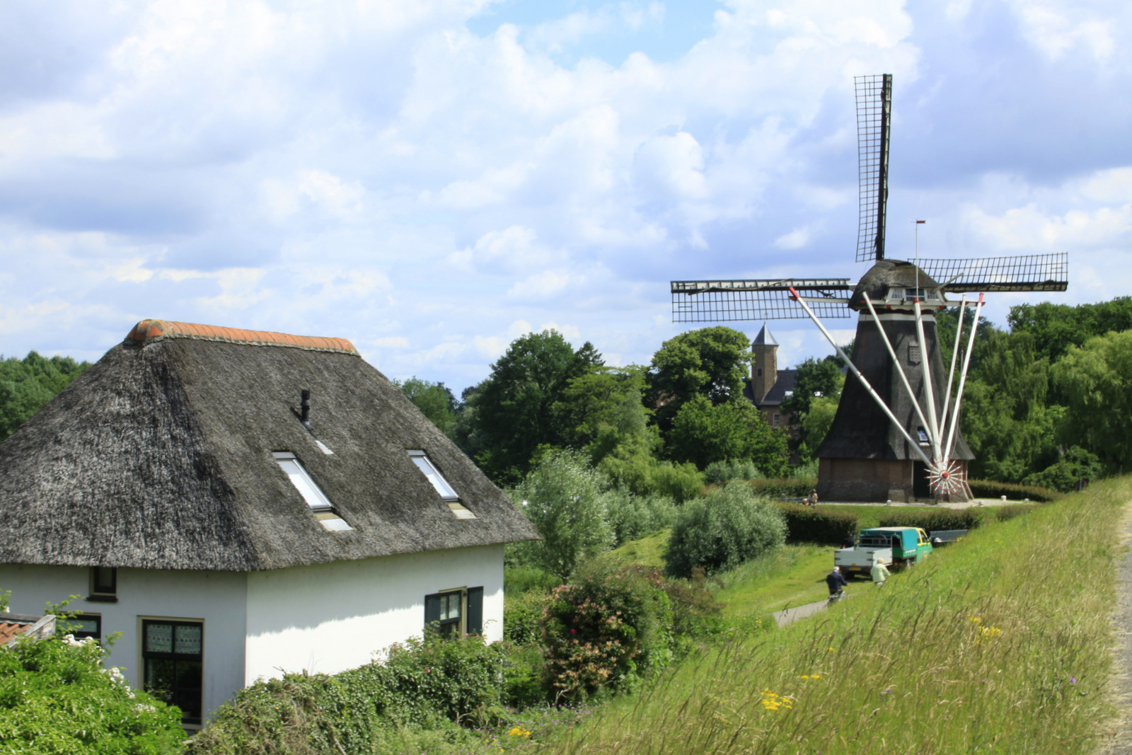 Het landschap vanaf de Waalbandijk bij Waardenburg.